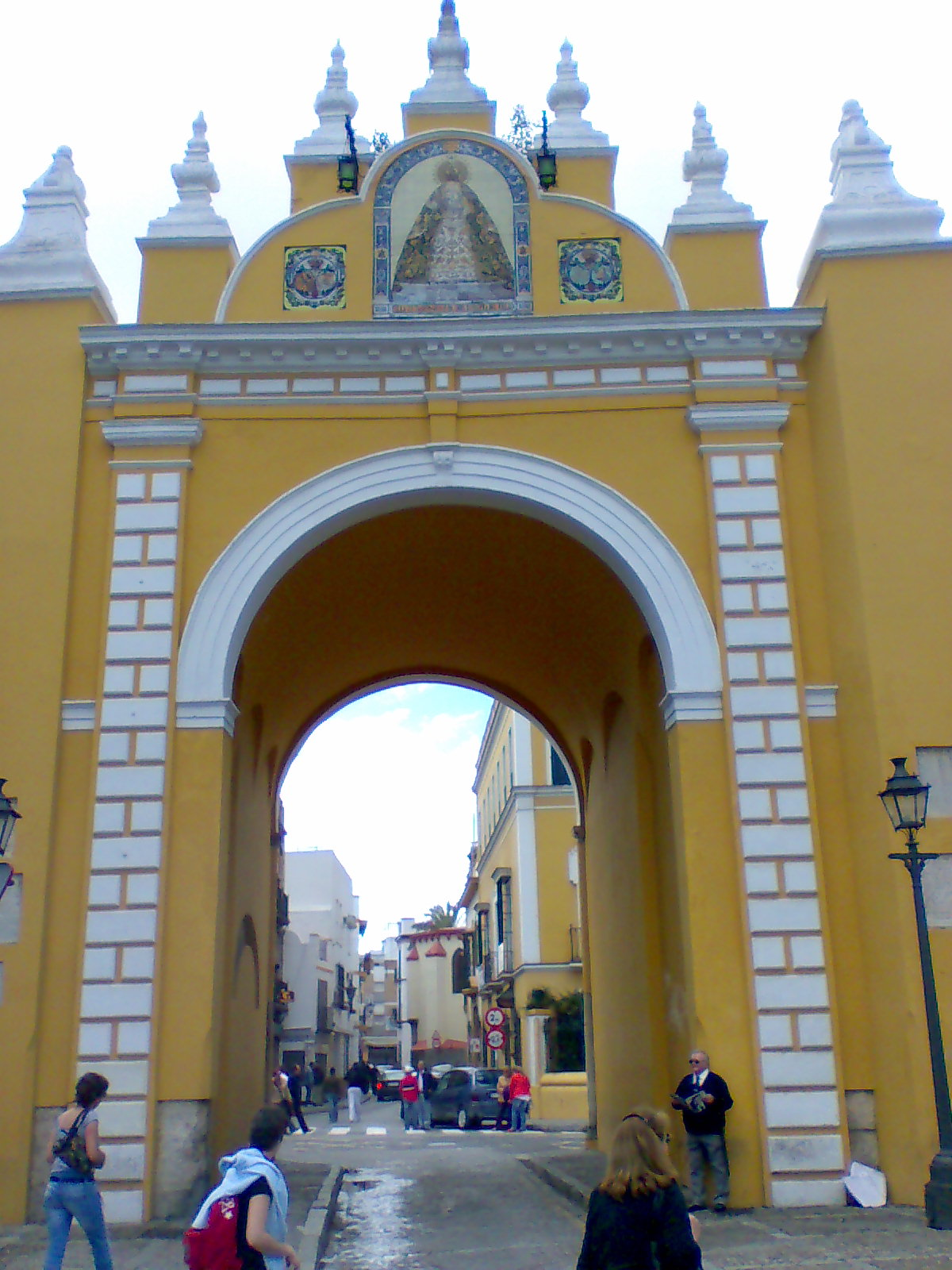 Arco de la Macarena (Sevilla).